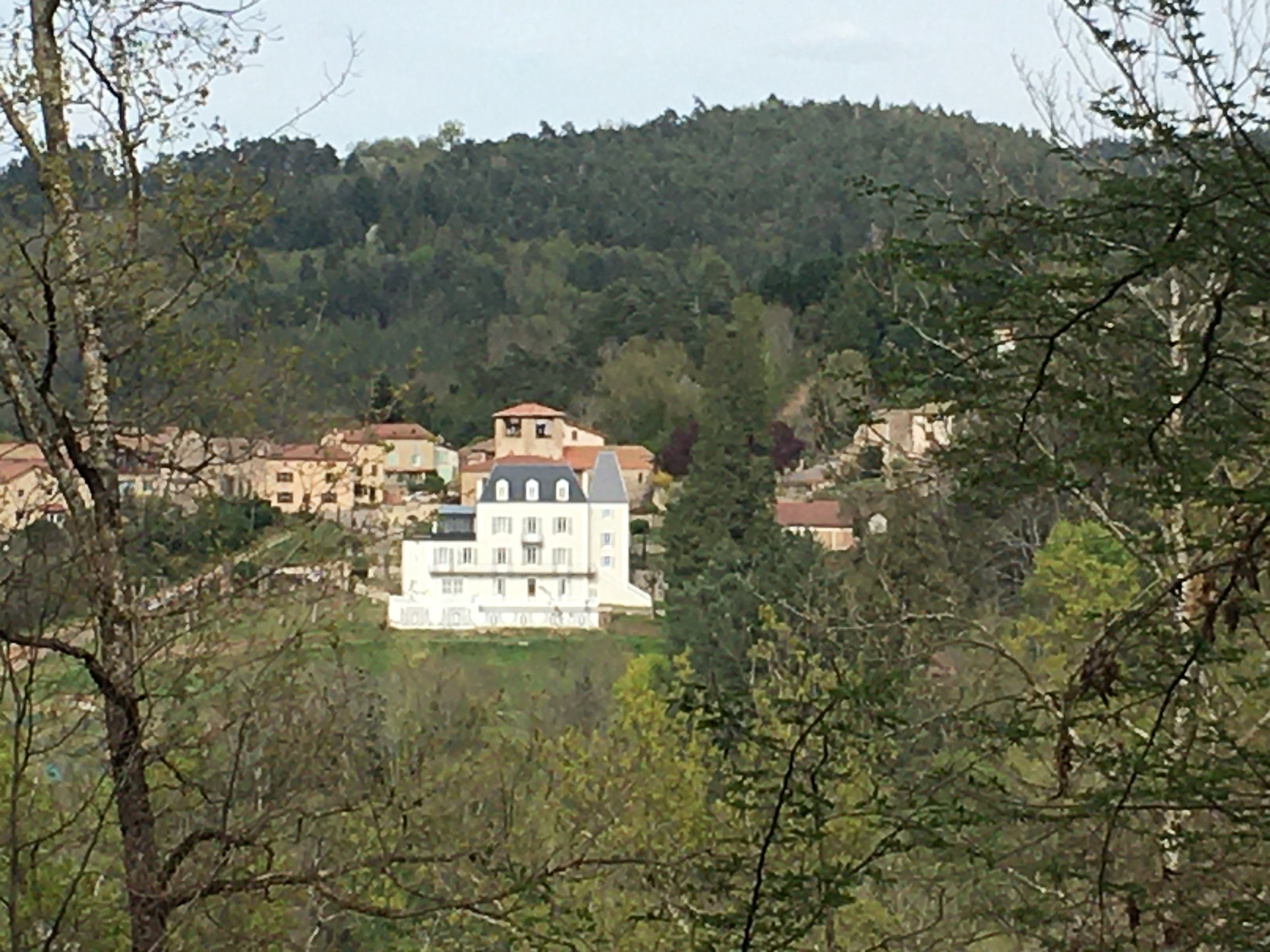 Château des Terrasses (63)